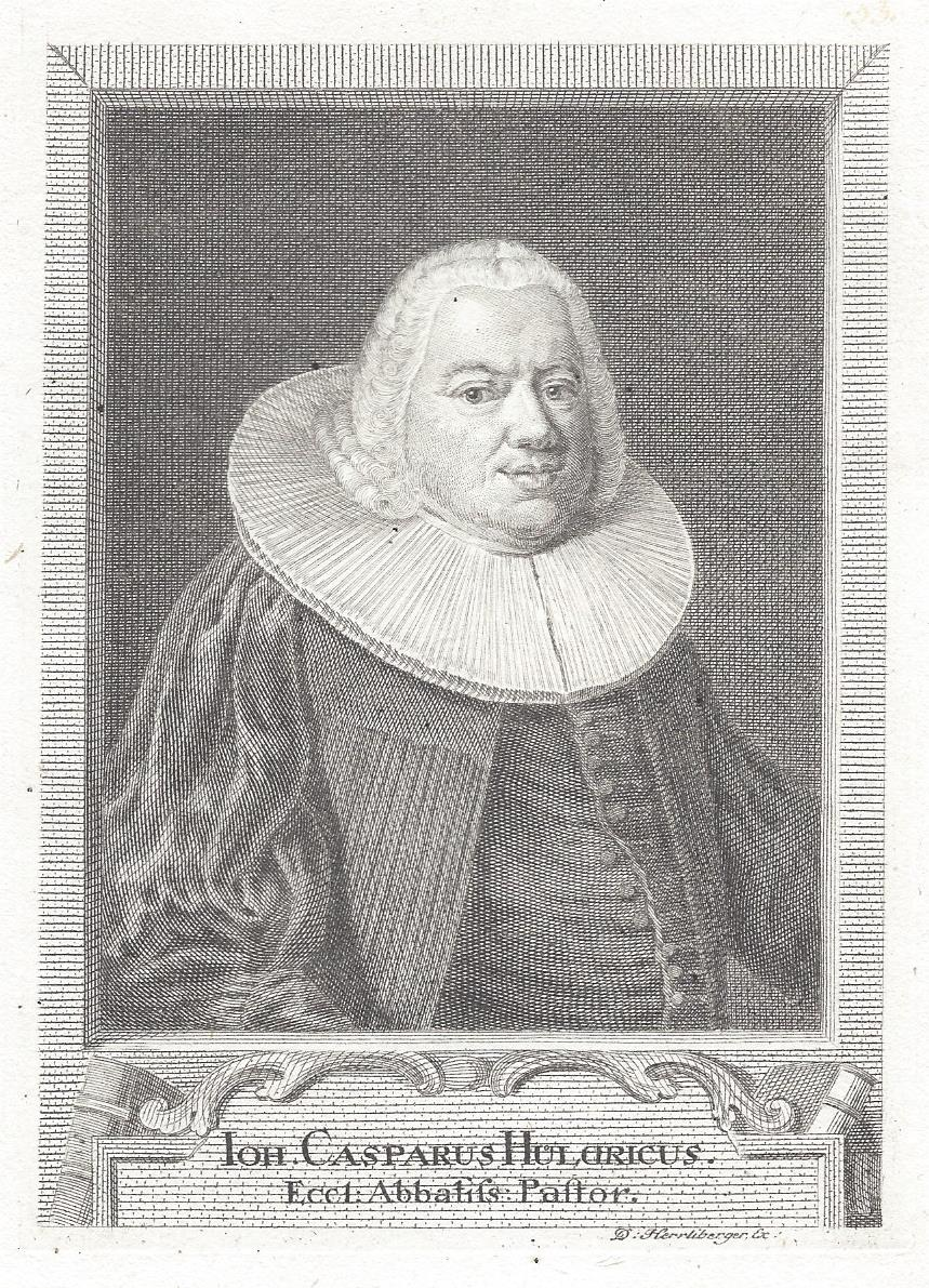 David Herrliberger (1697-1777): Johann Caspar Ulrich, Kupferstich.